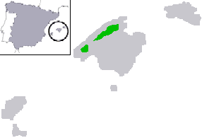 Distribución del sapillo balear (Alytes muletensis)